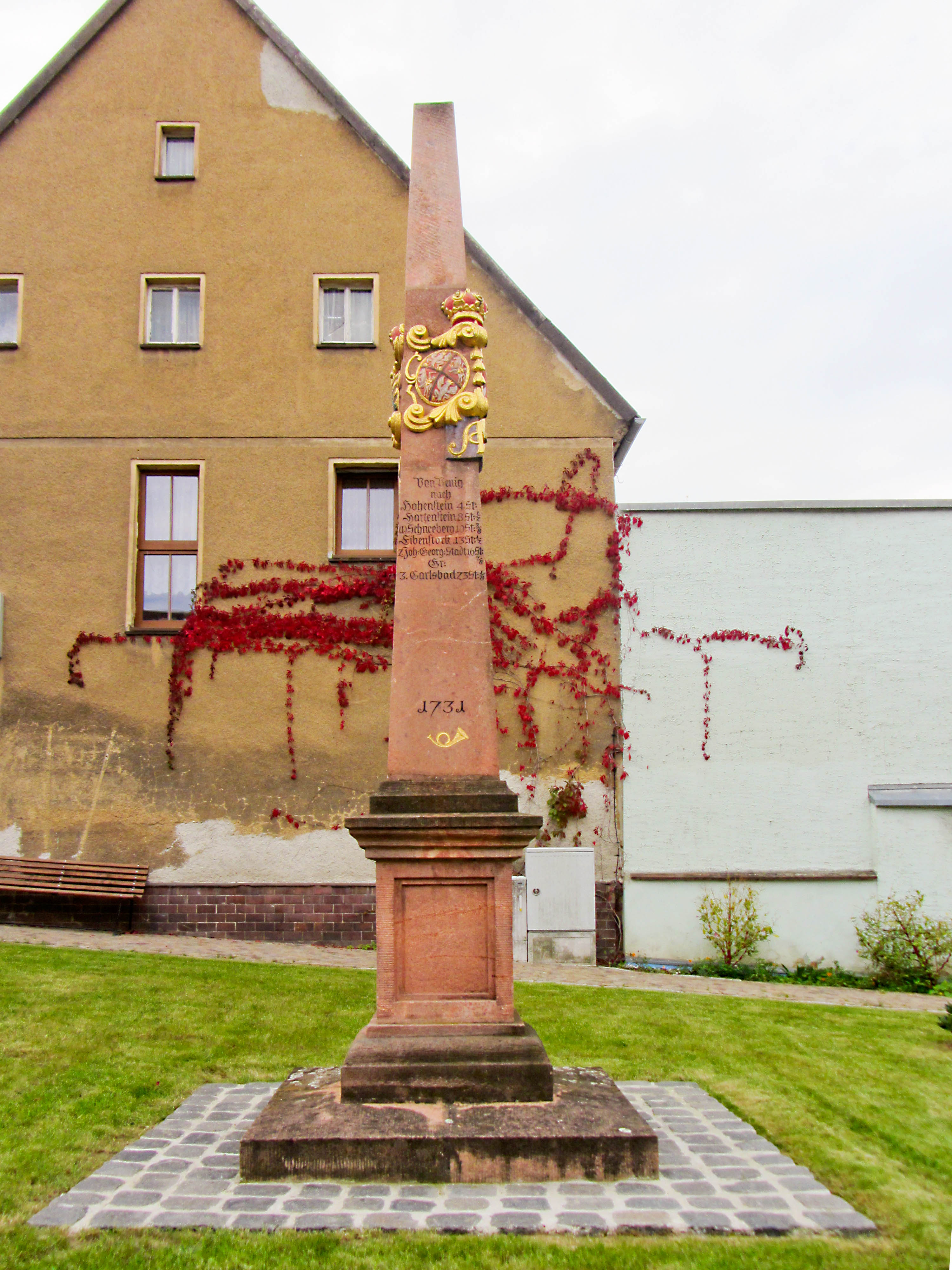 Kursächsische Postmeilensäule-Distanzsäule, Friedensstraße in Penig